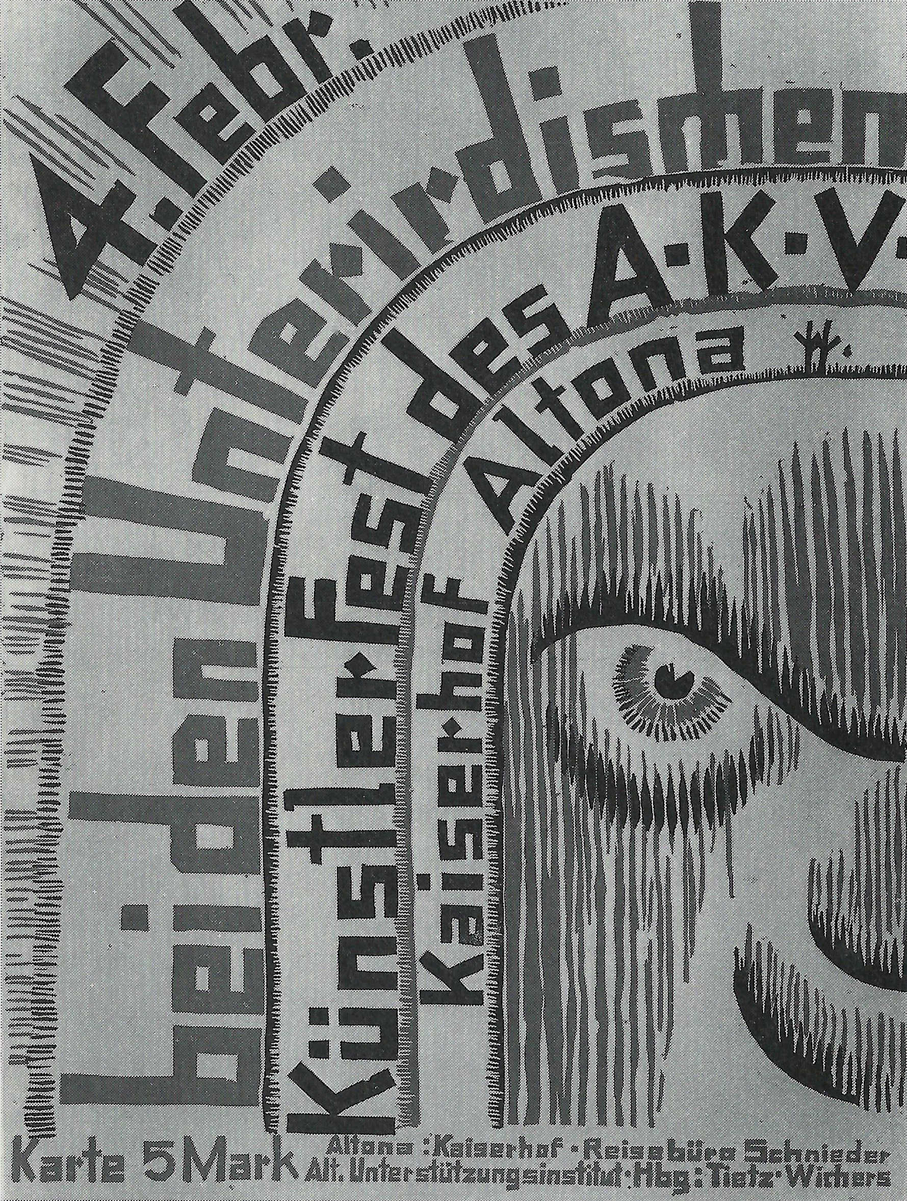 Schwarz-weiß-Abbildung des Plakats zum Altonaer Künstlerfest Bei den Unterirdischen des Altonaer Künstlervereins von Wenzel Hablik, 1928. Holzschnitt, 42,8 × 58,8 cm, Wenzel-Hablik-Musem (Wenzel-Hablik-Stiftung)